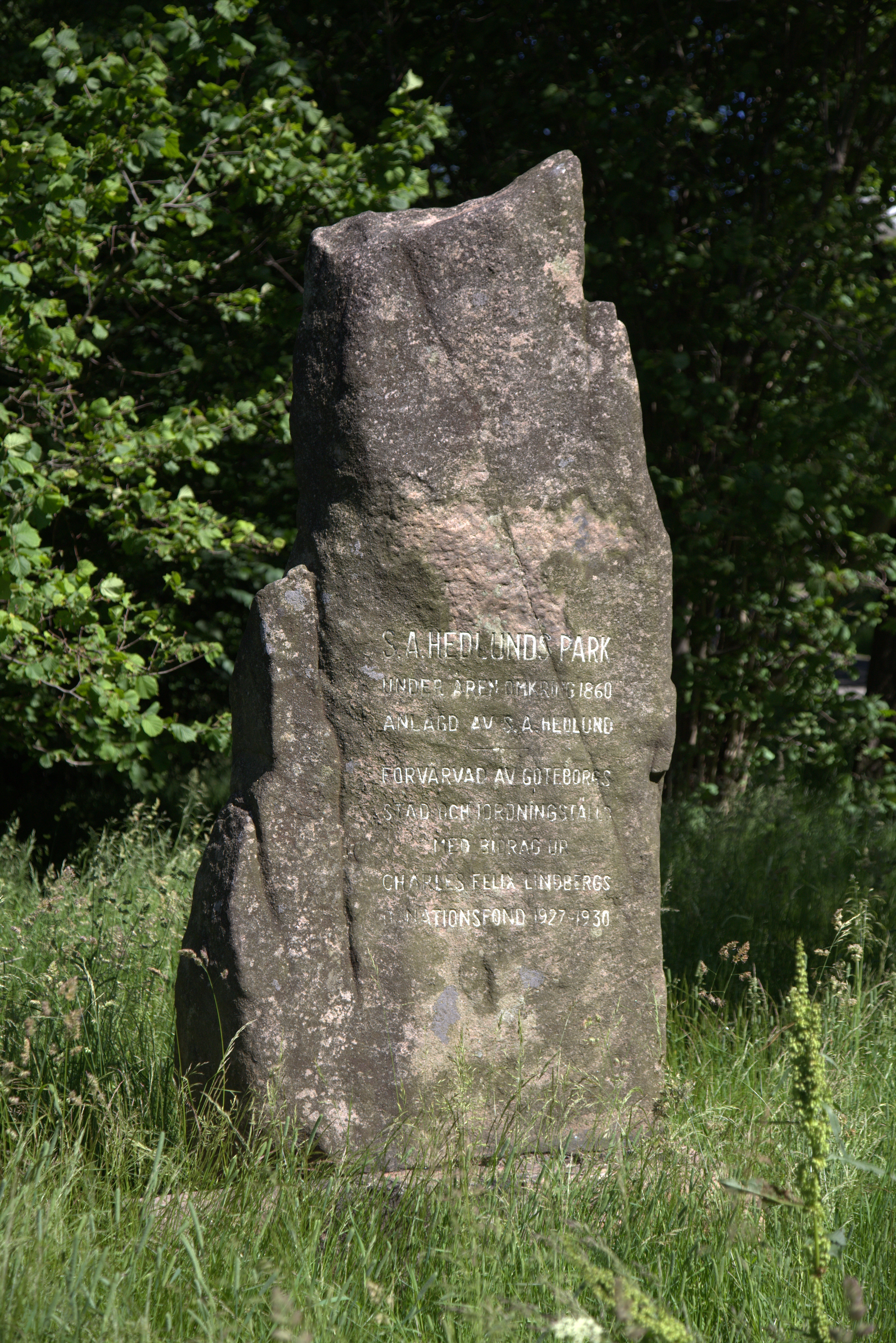 Inskription: S.A Hedlunds park Under åren omkring 1960 Anlagd av S. A. Hedlund --- Förvärvad av Göteborgs stad och iordningställd med bidrag ur Charles Felix Lindbergs donationsfond 1927-1930